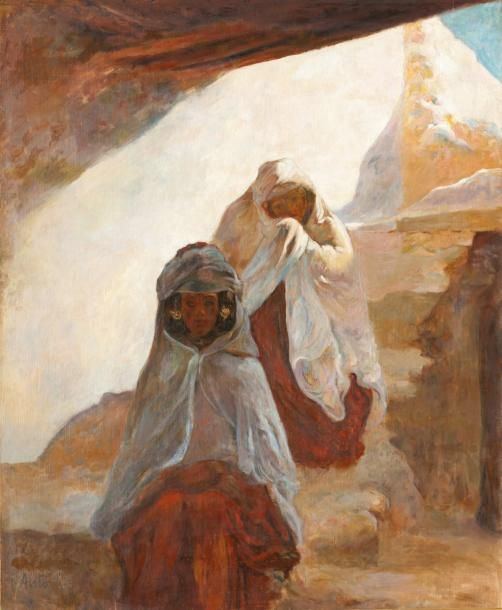 Femmes berbères